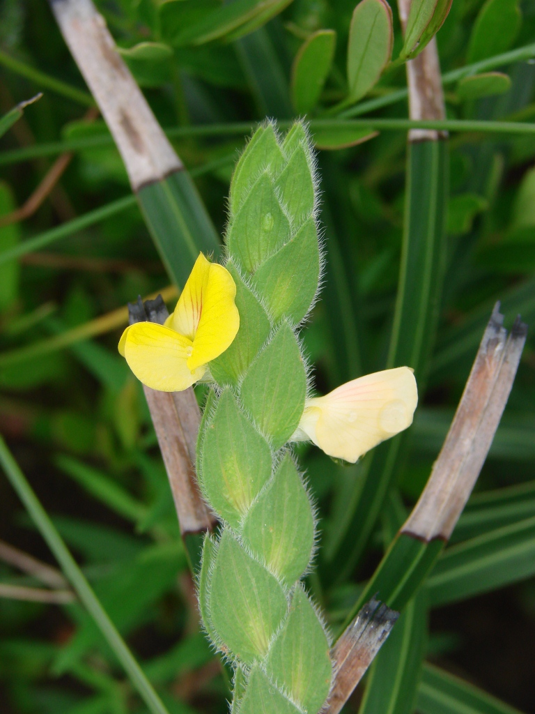 Zornia villosa (Malme) Herter ( sin. het. Zornia vestita Mohlenbr. ) - FABACEAE - Jardim Botânico de Brasília - Brasília - Distrito Federal - Brasil.